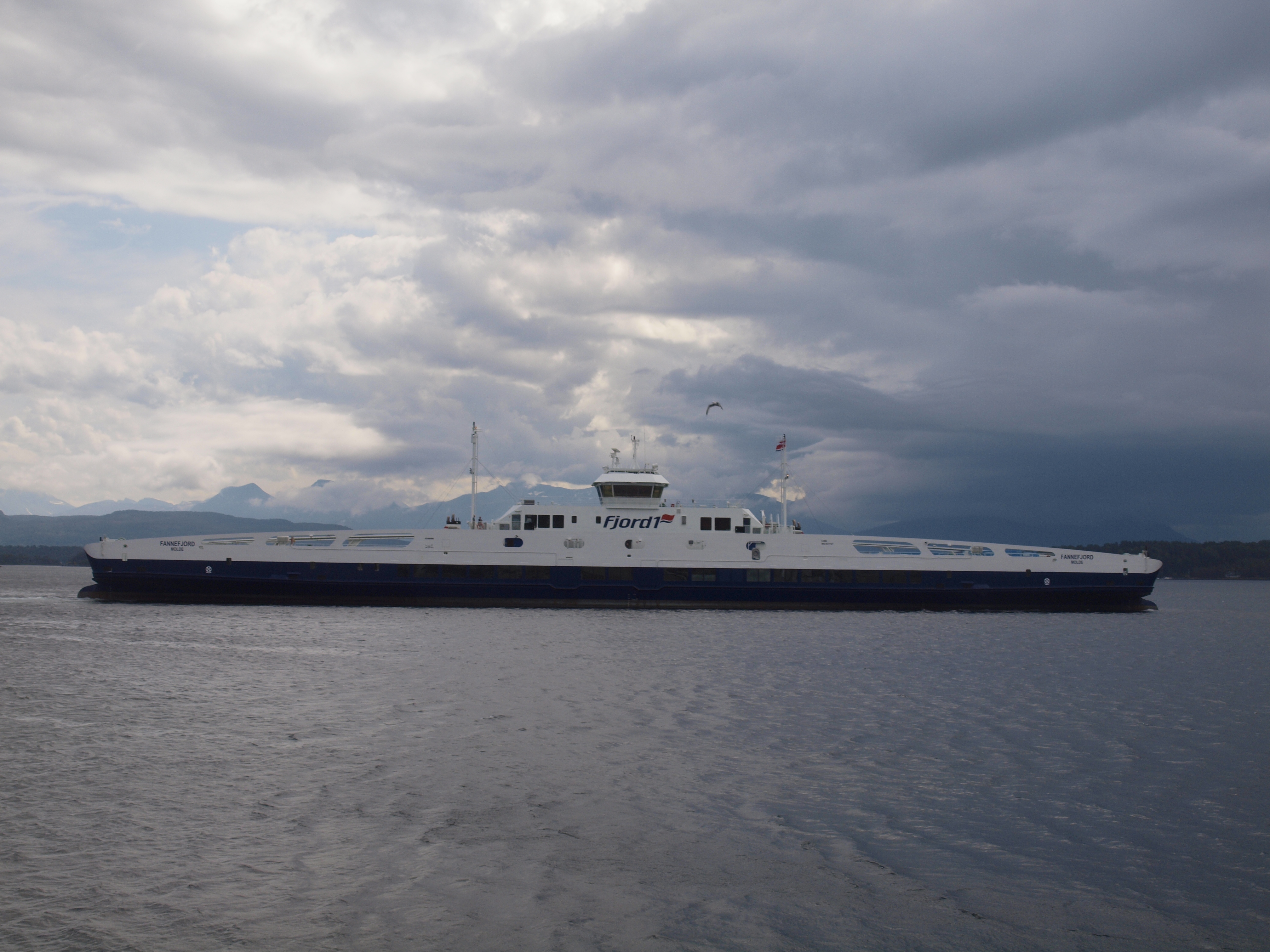 Fannefjord ferry Molde, Norway